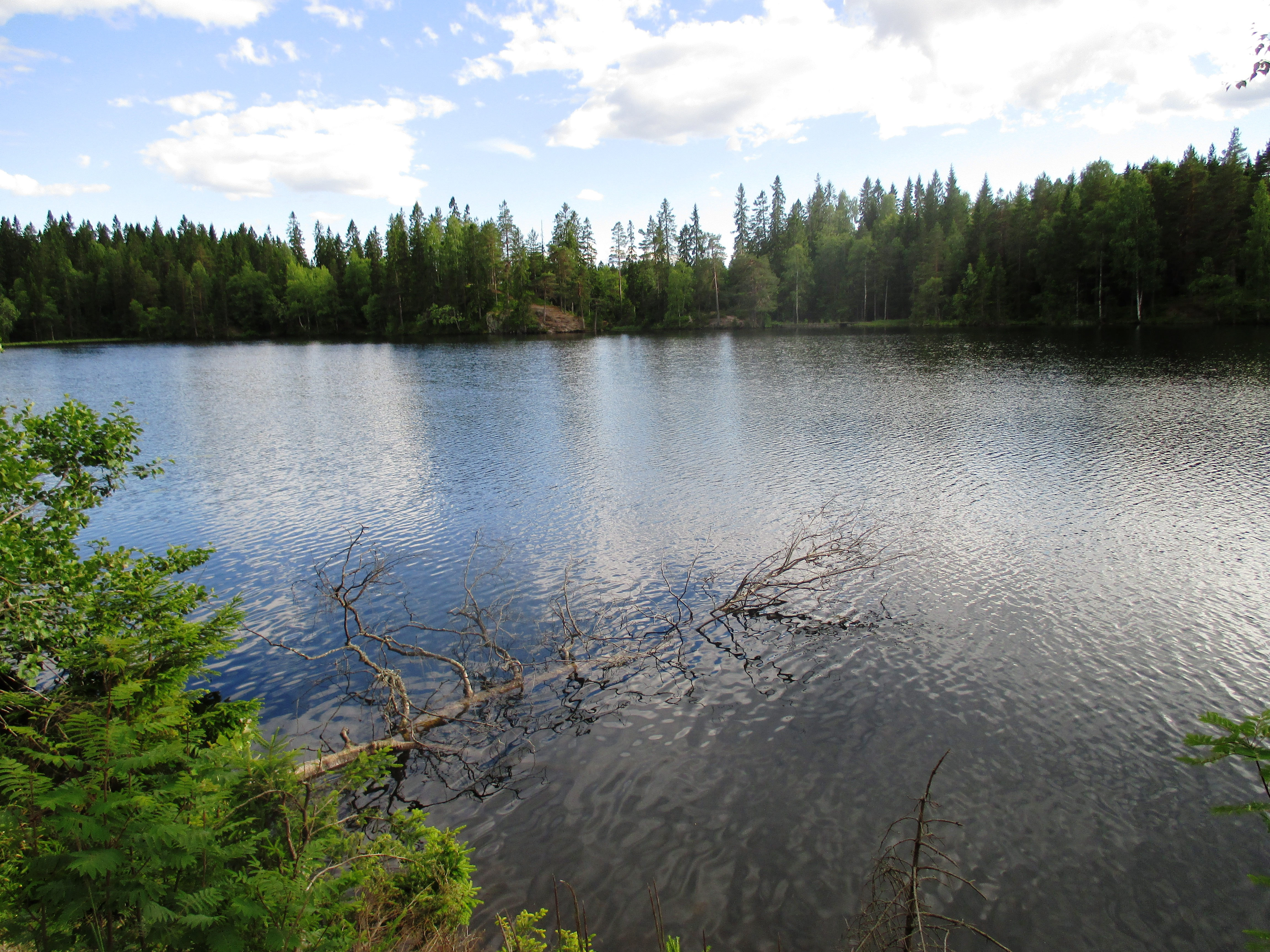 Store Åklungen i Nordmarka i Oslo